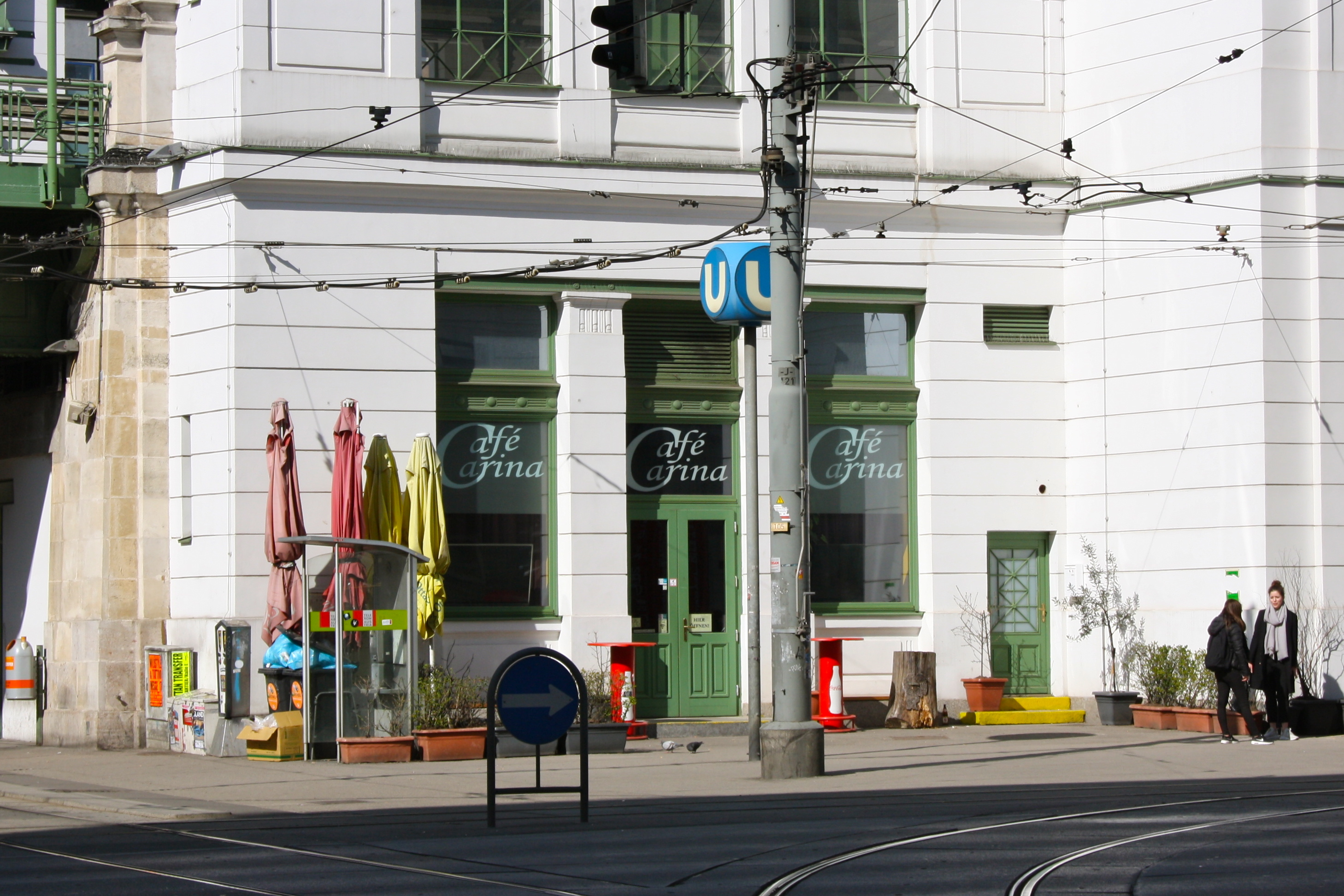 Café Carina in Wien-Josefstadt.